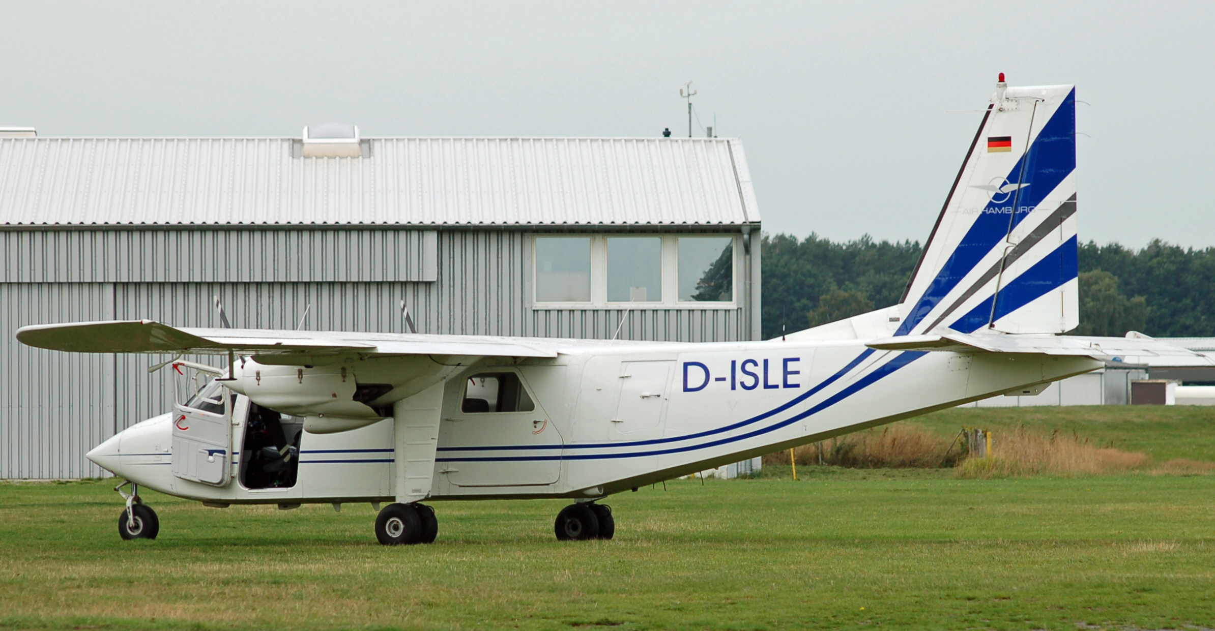 Britten-Norman BN-2 Islander (D-ISLE) von Air Hamburg auf dem Flugplatz Uetersen